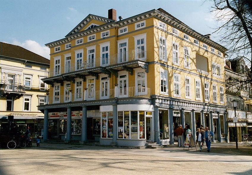 Haus Ockel, Brunnenplatz 1, 31812 Bad Pyrmont